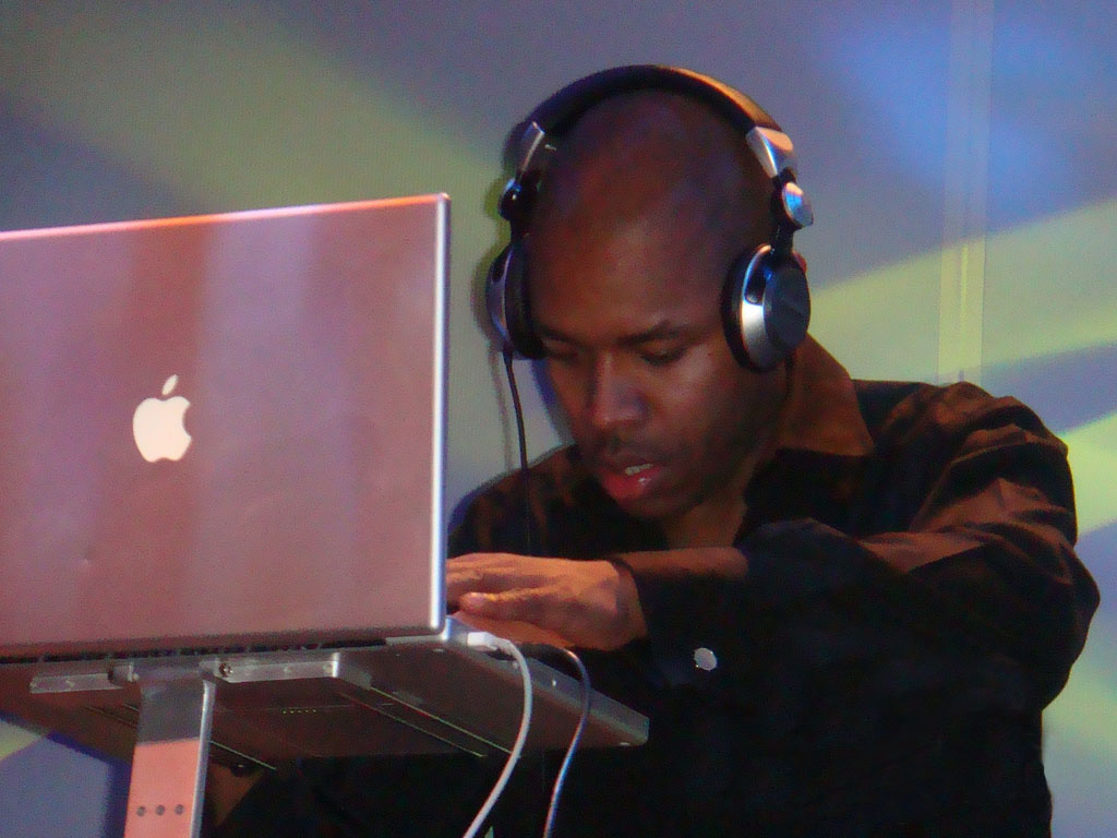 D-Nice